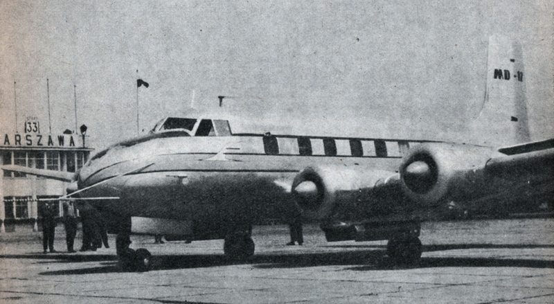 Pierwszy prototyp samolotu PZL MD-12 o znakach rejestracyjnych SP-PAL na płycie lotniska Okęcie